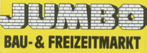 1982 wechselt JUMBO das Logo aus. Die blaue Unternehmensfarbe verschwindet. Die Firma erscheint in weissen Ziegelsteinen.